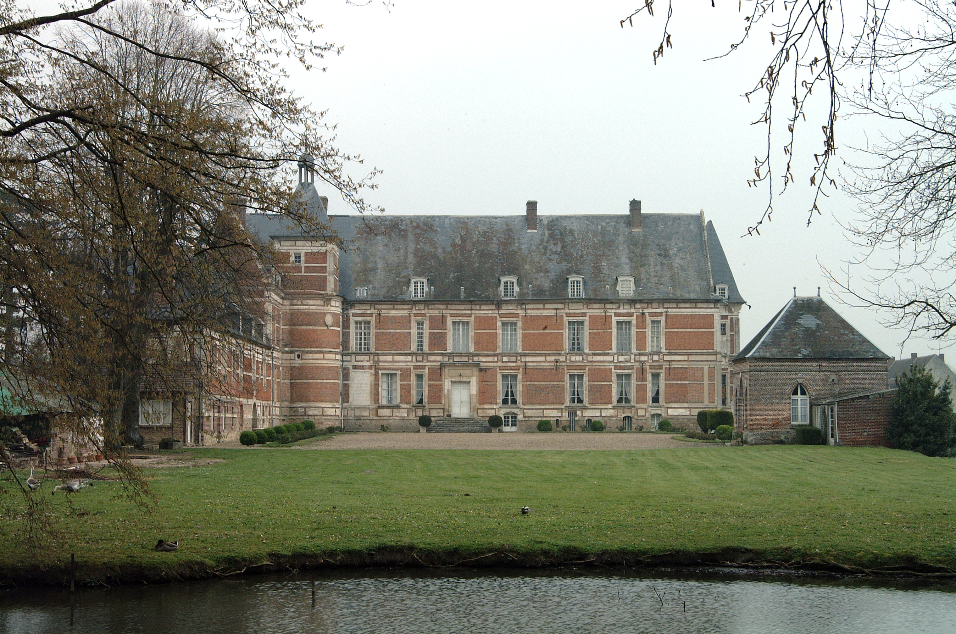 Le Chateau de Troissereux